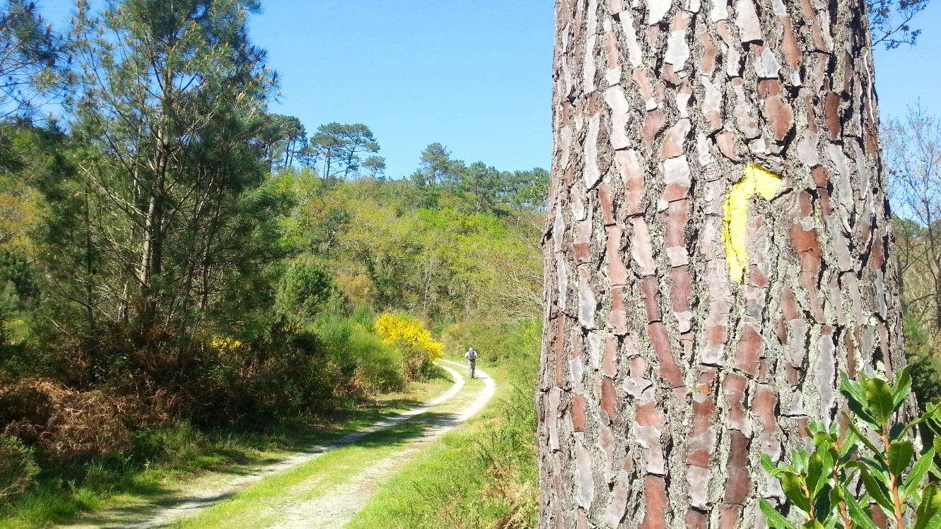 Un sentier de randonnée à Seignosse